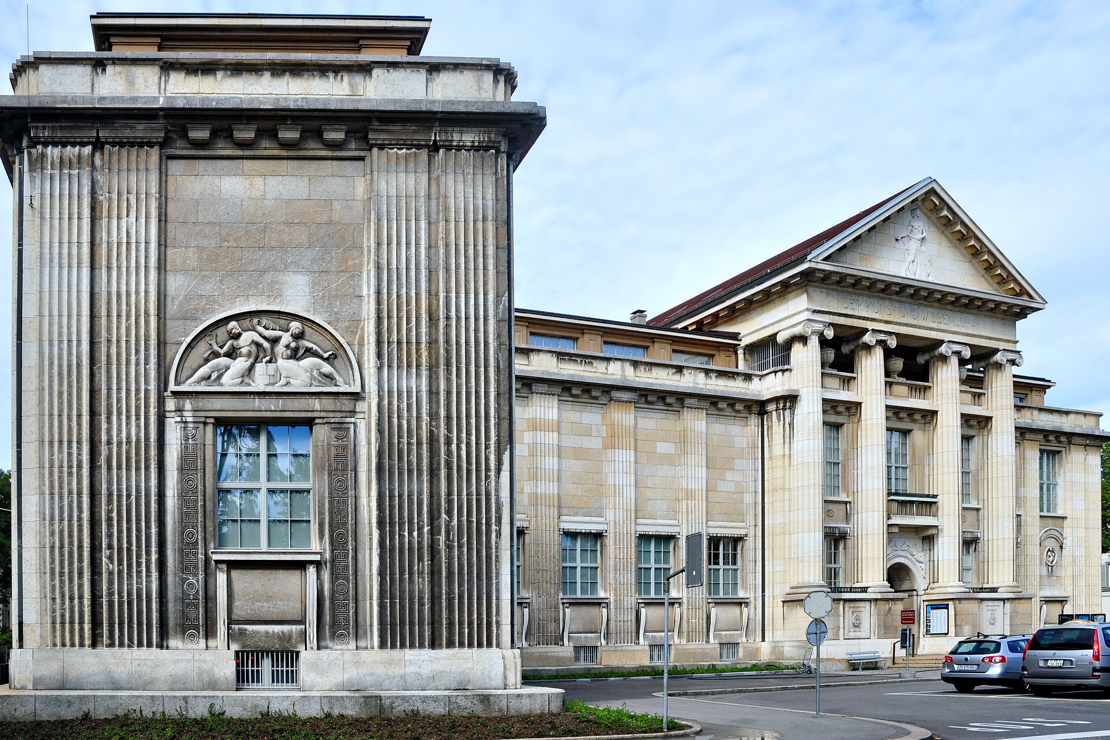 Kunstmuseum, Winterthurer Bibliotheken, Sondersammlungen sowie Naturwissenschaftliche Sammlungen, Museumstrasse 52 in Winterthur (Switzerland)